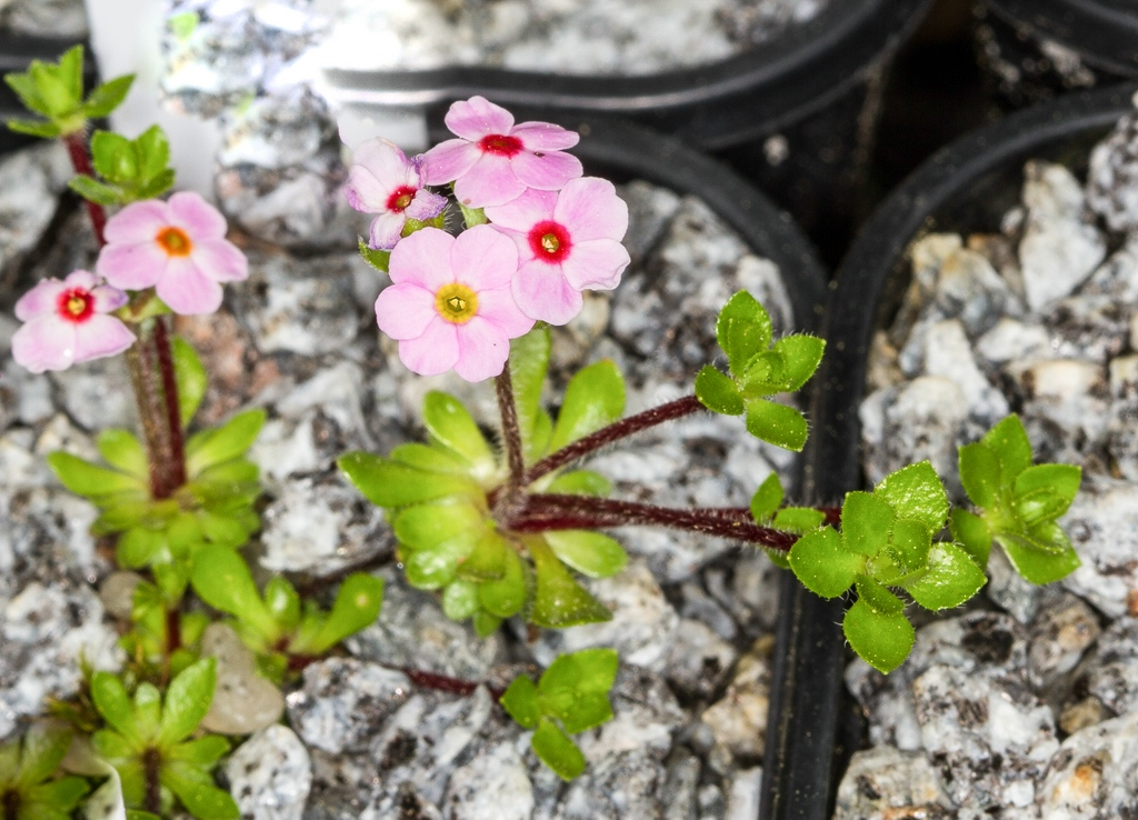 Arktisch-alpiner Garten Chemnitz: Androsace brachystegia